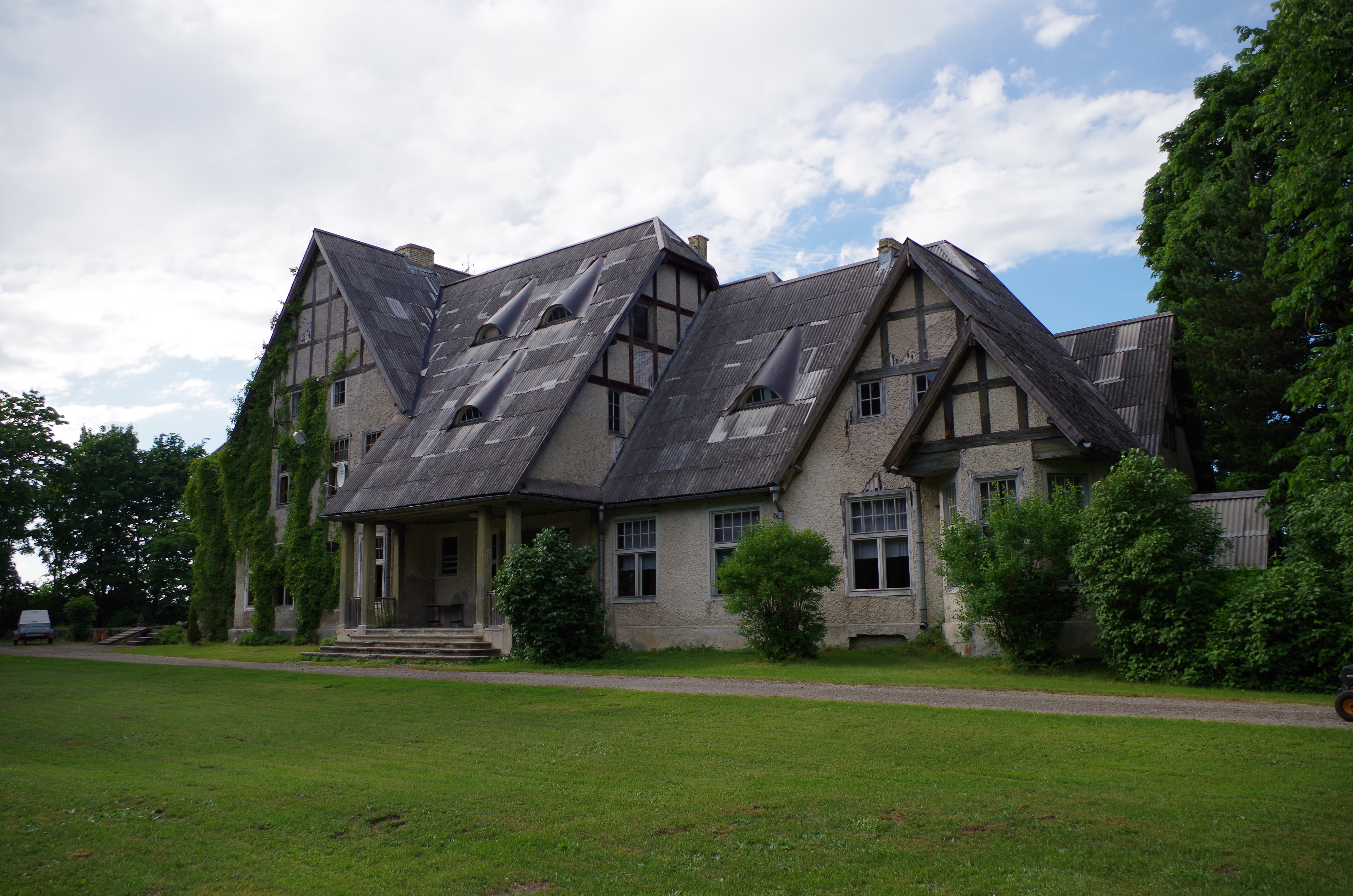 Vaade peamajale